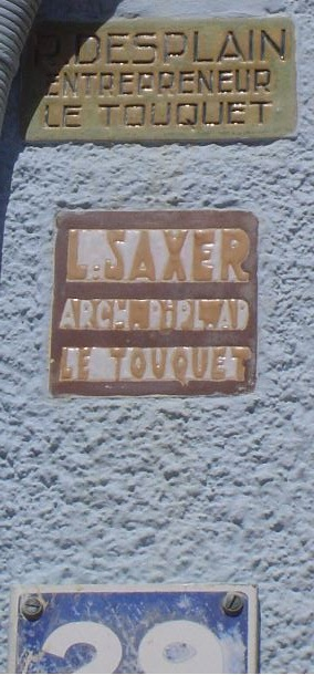 Plaques Desplain et Saxer